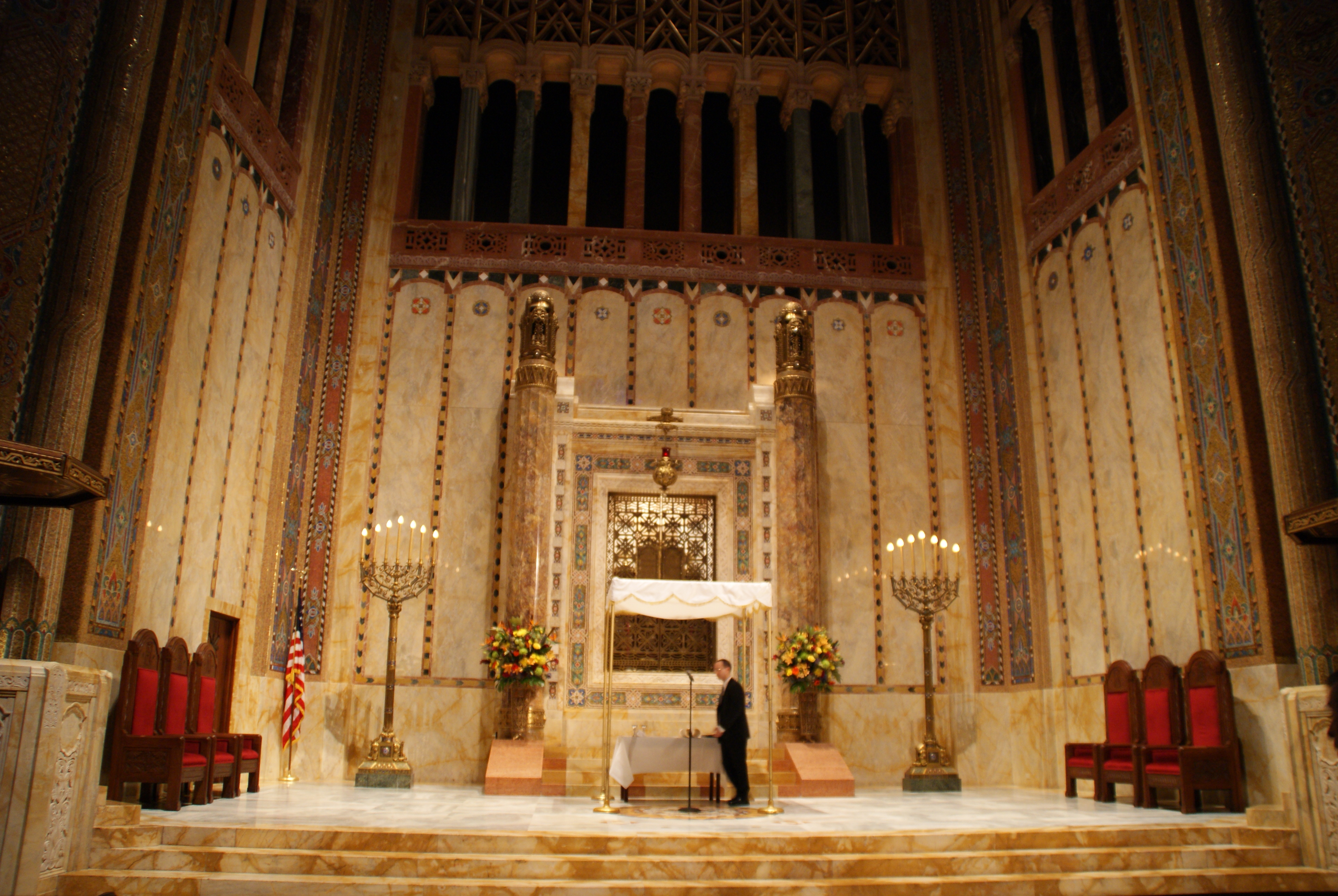 Altar major